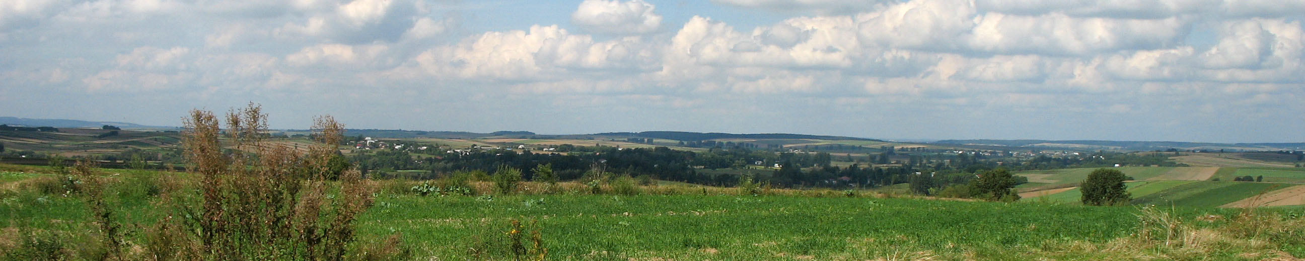 Pogórze Rzeszowskie (Poland)